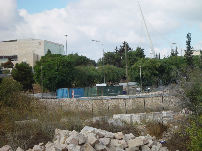 בית עלמין קטן, סמוך לשערי צדק